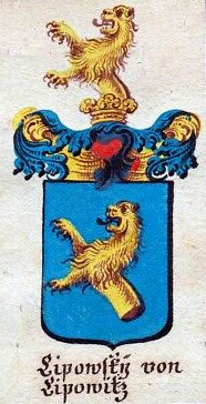 Wappen derer Lipowsky von Lipowitz, böhmisches Adelsgeschlecht